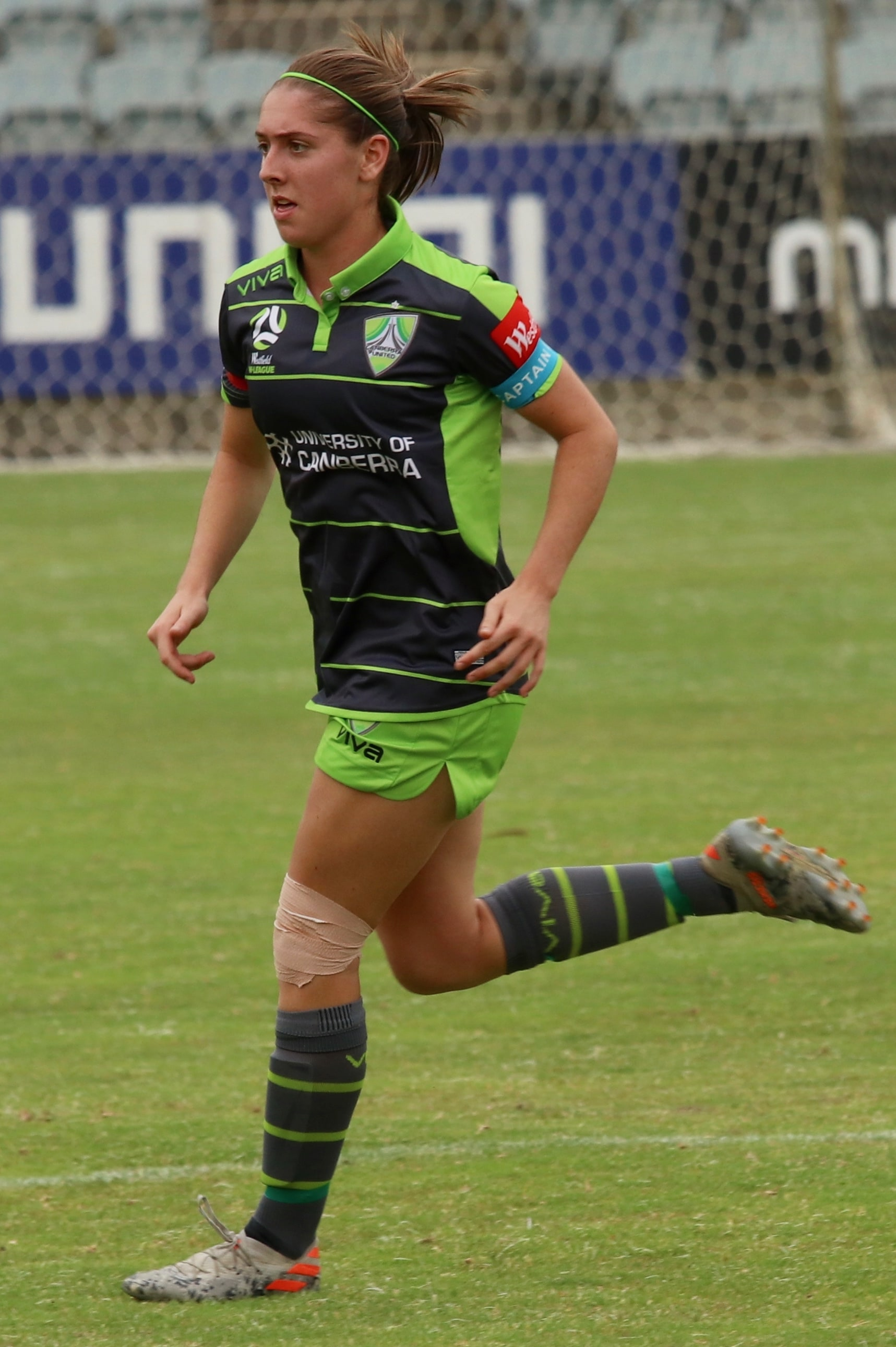 RoestbakkenWeber